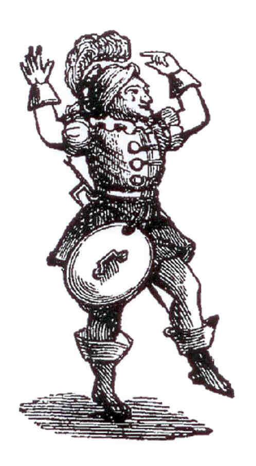 Carnavaleux parisien.